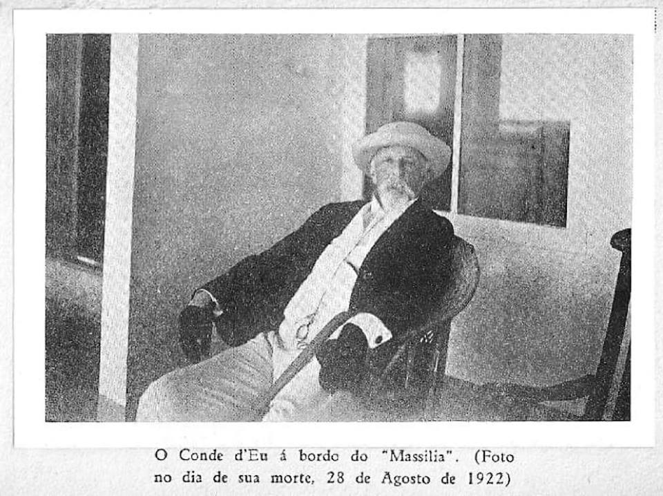 Fotografia do Conde D'Eu a bordo do "Massilia".